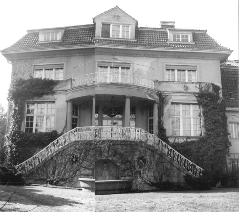 Zentralbild-Weiß- 21.3.1953 Zu Ehren des Großen Stalin Das Haus in Potsdam-Babelsberg, in dem J.W. Stalin während der Potsdamer Konferenz im Jahre 1945 wohnte, wird auf Beschluß des Zentralkomitees der Sozialistischen Einheitspartei Deutschlands Erinnerungsstätte. UBz: Das Haus in der Karl-Marx-Straße 27, in dem Stalin wohnte. (Hinterseite des Hauses). [Bildmontage unten, Mitte links]